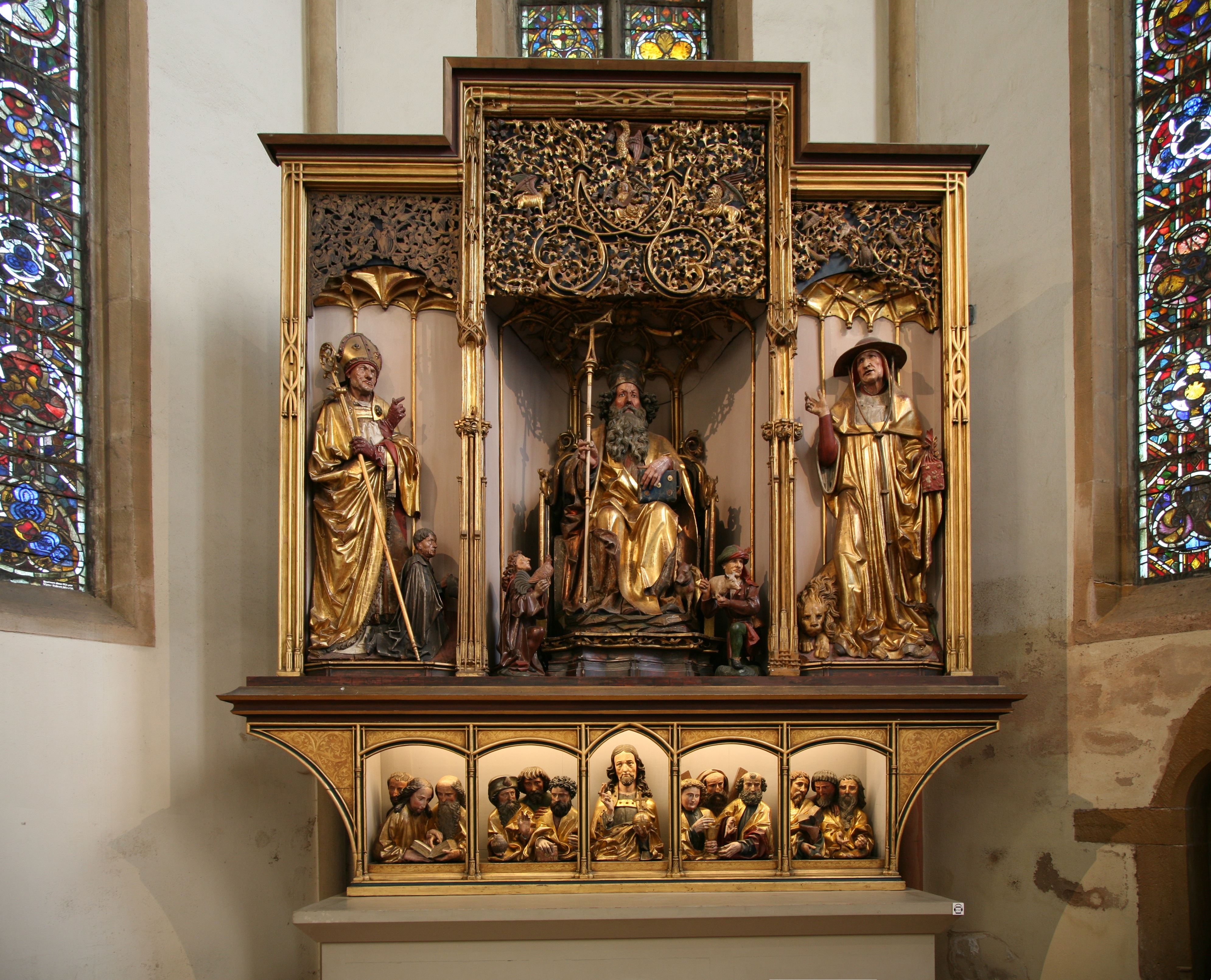 Retable d'Issenheim : partie sculptée (attribuée à Nicolas de Haguenau, sculpteur à Strasbourg vers 1500). Saint Augustin et Guy Guers, Saint Antoine, les porteurs d’offrande, Saint Jérôme, Le Christ et les apôtres Le retable ouvert permettait aux pèlerins et malades de vénérer saint Antoine, protecteur et guérisseur du feu de Saint-Antoine ou mal des ardents. Saint Antoine trône, tel un souverain, au centre de la caisse et à ses côtés se trouve l’emblème de la communauté, le cochon. De part et d’autre, deux porteurs d’offrande illustrent ces dons en nature, importante source de revenus pour les Antonins. Cette niche centrale est encadrée par saint Augustin et saint Jérôme, pères de l’Église. Le commanditaire, Guy Guers, est agenouillé aux pieds de saint augustin. Le Christ et les douze apôtres, technique mixte (tempera et huile) sur panneaux de tilleul et sculptures en tilleul polychromé